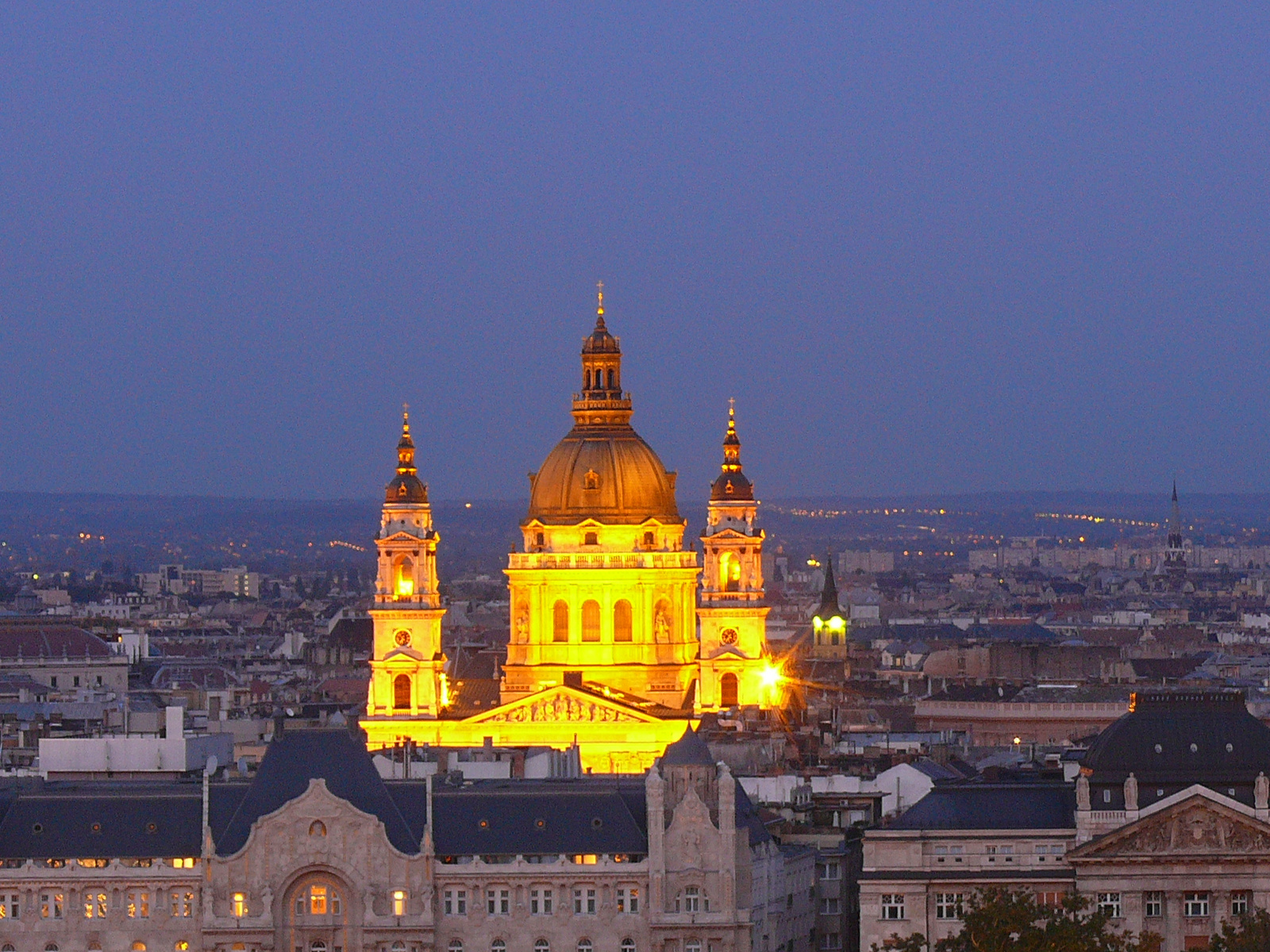 Bazilika (Budapest 5, Szent István tér) This is a photo of a monument in Hungary. Identifier: 615